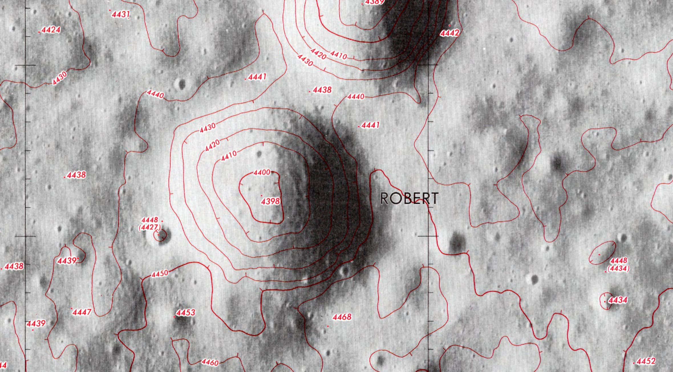 Lunar Topophotomap. Detalle plano 1/10.000 (cráter Robert)